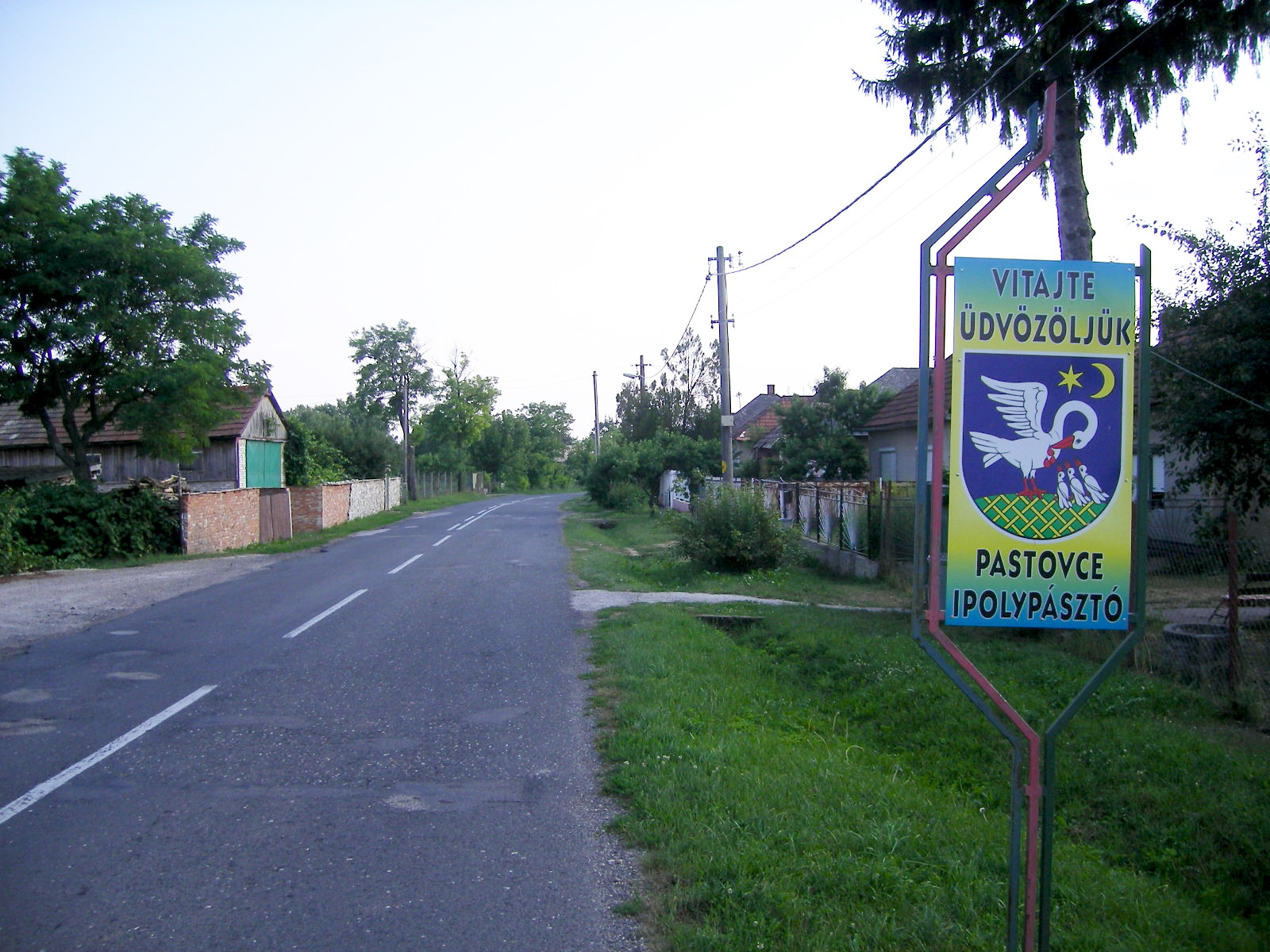 Ipolypásztó - címeres üdvözlőtábla